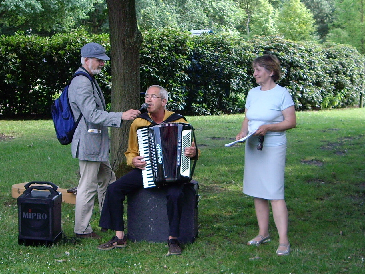 Witha Winter von Gregory mit Gerd klatt vom ev. Bildungswerk Bremen und dem Künstler Willy Schwarz anlässlich des Kulturspaziergangs 2008 im Garten der Menschenrechte Bremen